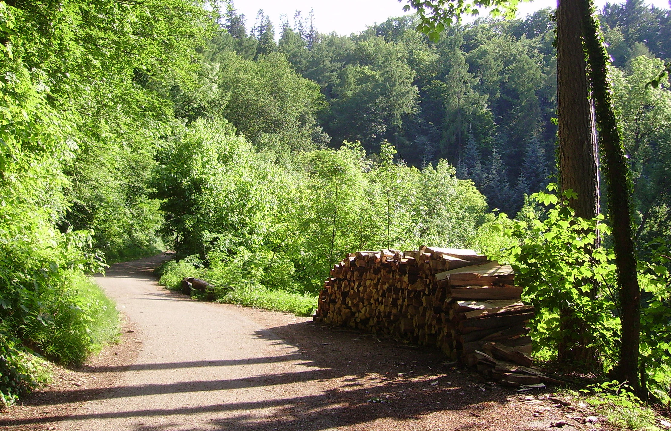 view of Weinheim, Germany